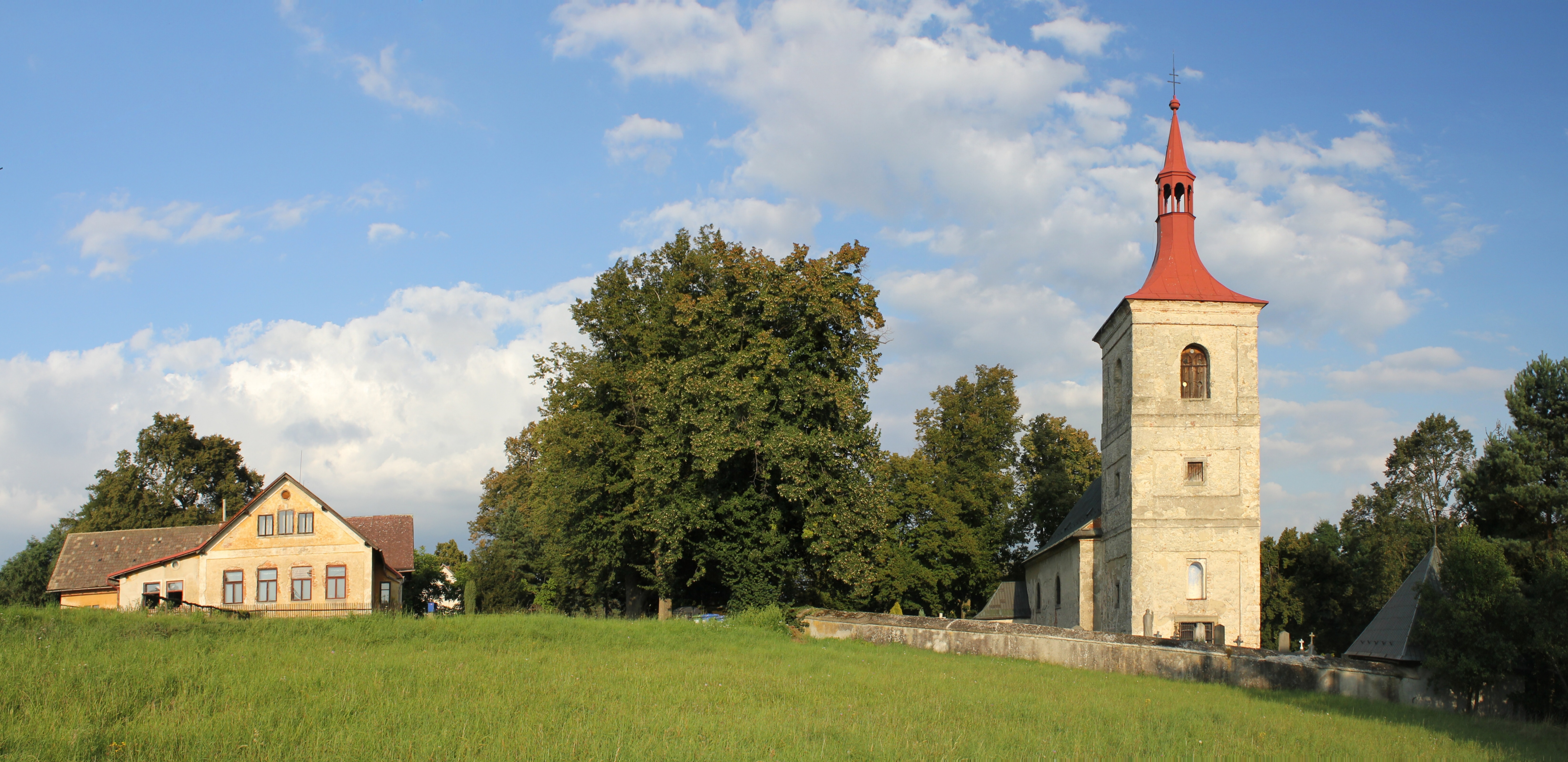 Panaroma Letařovic s kostelem svatého Jakuba Staršího